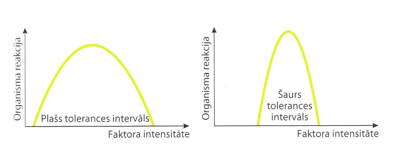 Eiribionta un stenobionta tolerances līkņu salīdzinājums[1]